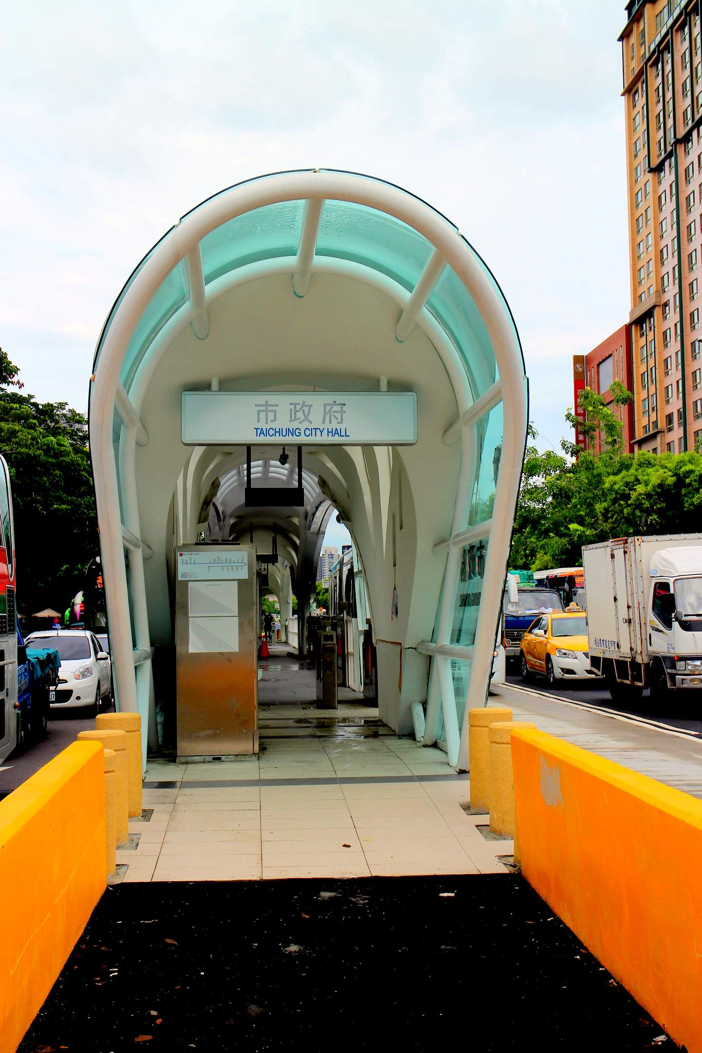 中文（台灣）: 台中市BRT市政府站站體